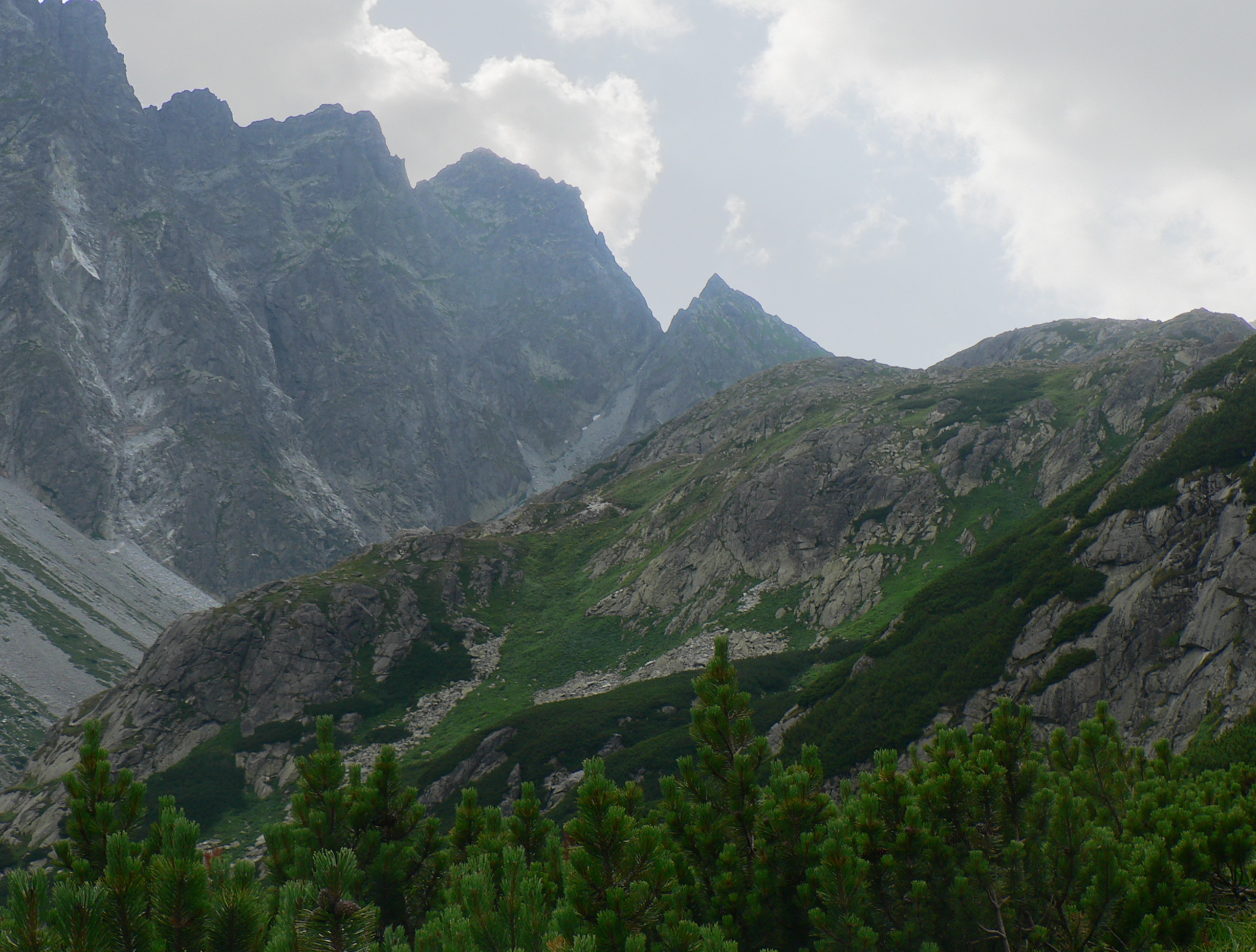 Capie Turnie, Hlińska Turnia i Koprowska Turnia